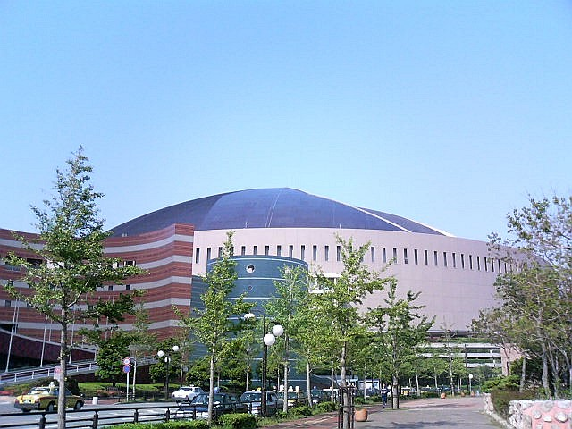 福岡ドーム外観。球場南西方向より。 2006年5月20日に投稿者(Muyo master)自身が撮影。 2006年5月23日 (火) 23:49 . . Muyo master . . 640×480 (98,745 バイト)